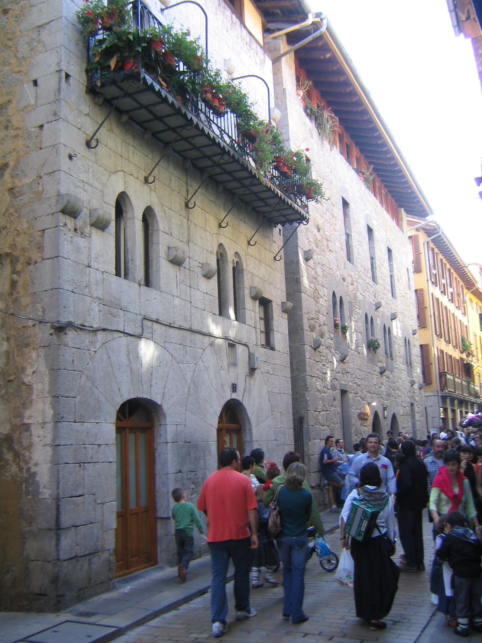 Torre Antxia y Palacio de Ansotegi. Markina, Vizcaya, País Vaco, España.